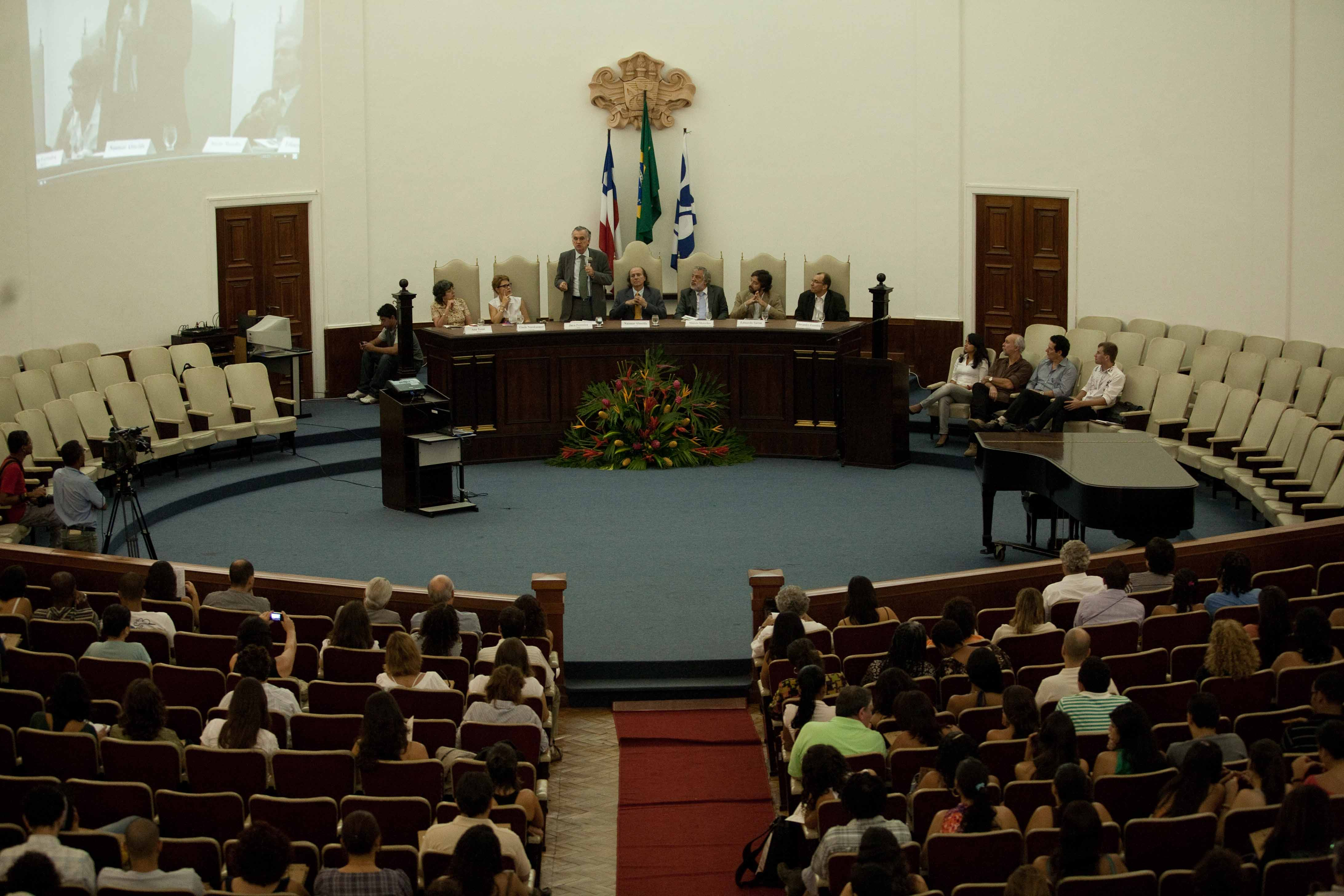 Ministro Juca Ferreira participa do VI ENECULT - Encontro de Estudos Multidisciplinares em Cultura na Reitoria da Universidade Federal da Bahia em Salvador.